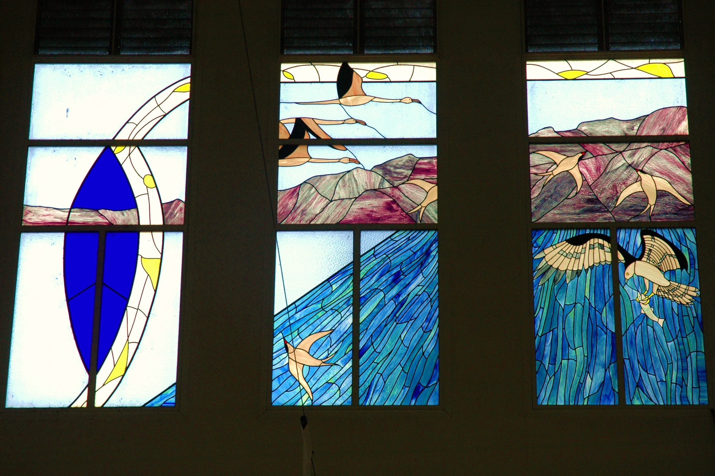 Mercat municipal d'Amposta-Vitrall